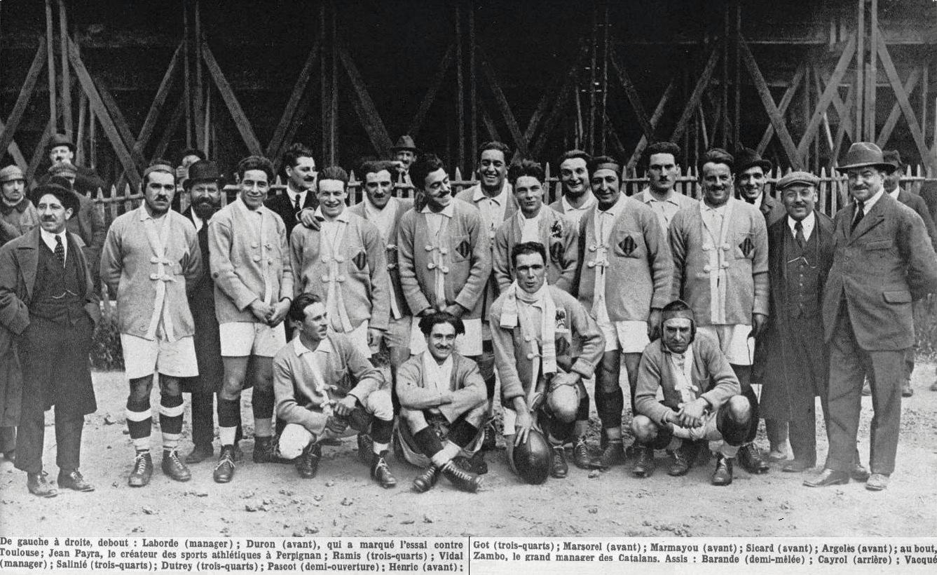 L'US Perpignannaise, championne de France de rugby en avril 1921.